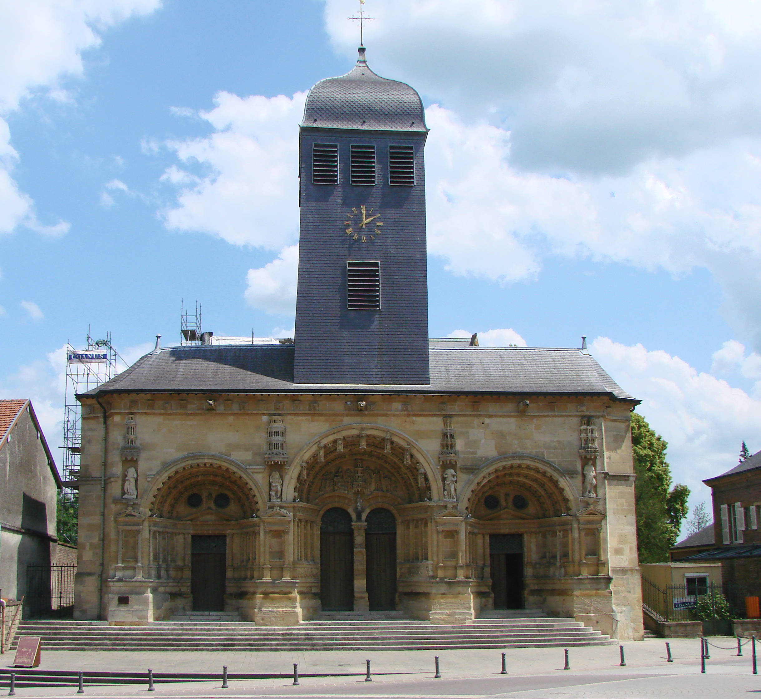 Eglise Saint-Maurille, Vouziers, Ardennes. Son portail Renaissance (milieu XVIème) est très particulier.